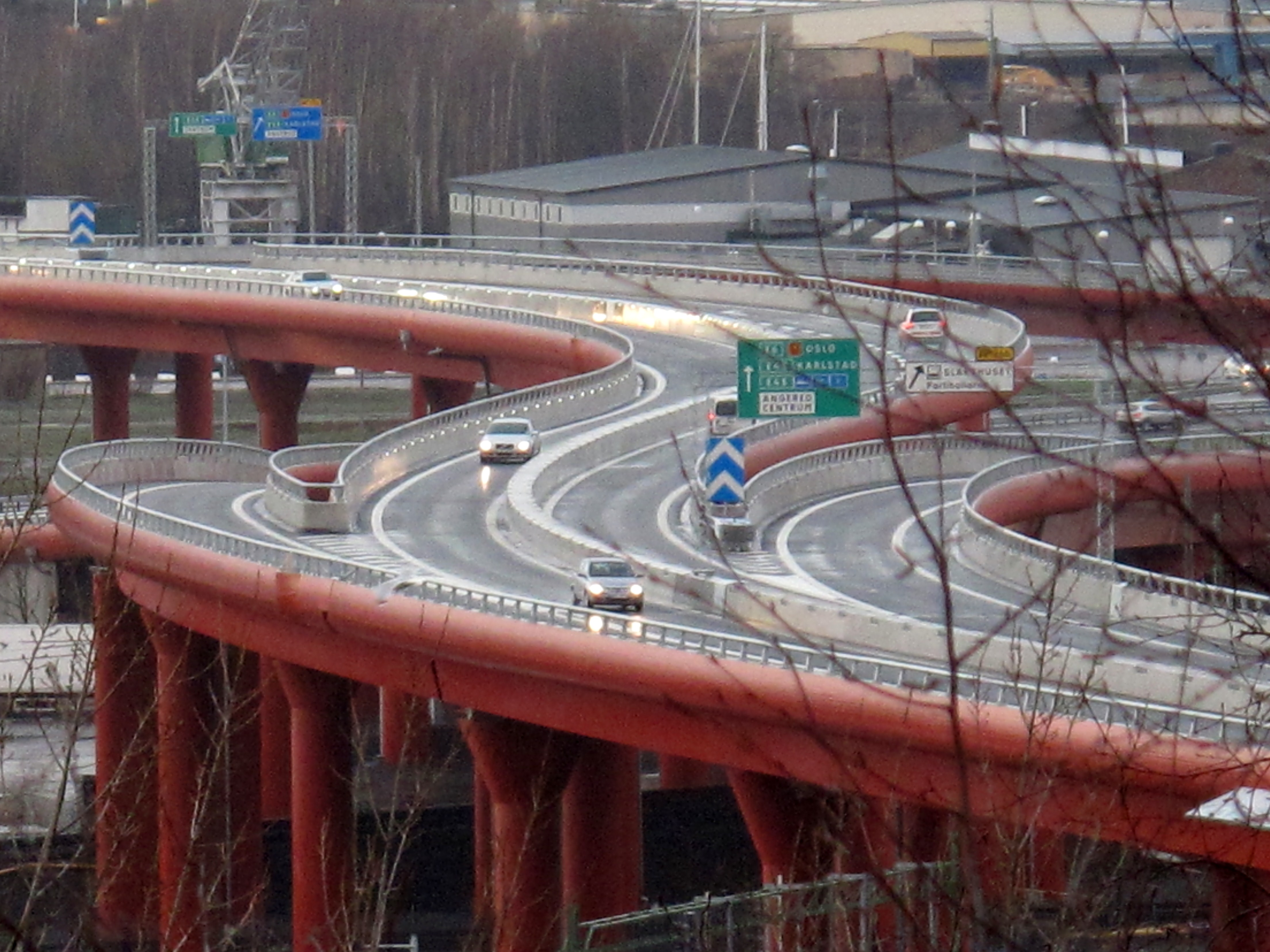 Partihallsförbindelsen i Göteborg.